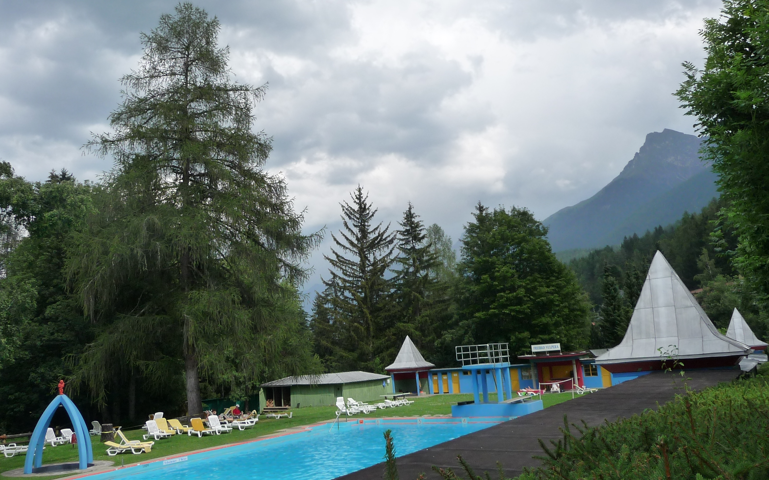 Das 1930 durch die "Hotelgesellschaft Waldhaus Vulpera" erbaute dritte Hotel-Freibad in der Schweiz (auch Strandbad genannt).